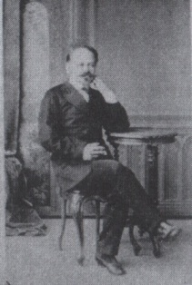 Арцём Ігнацьевіч Вярыга-Дарэўскі